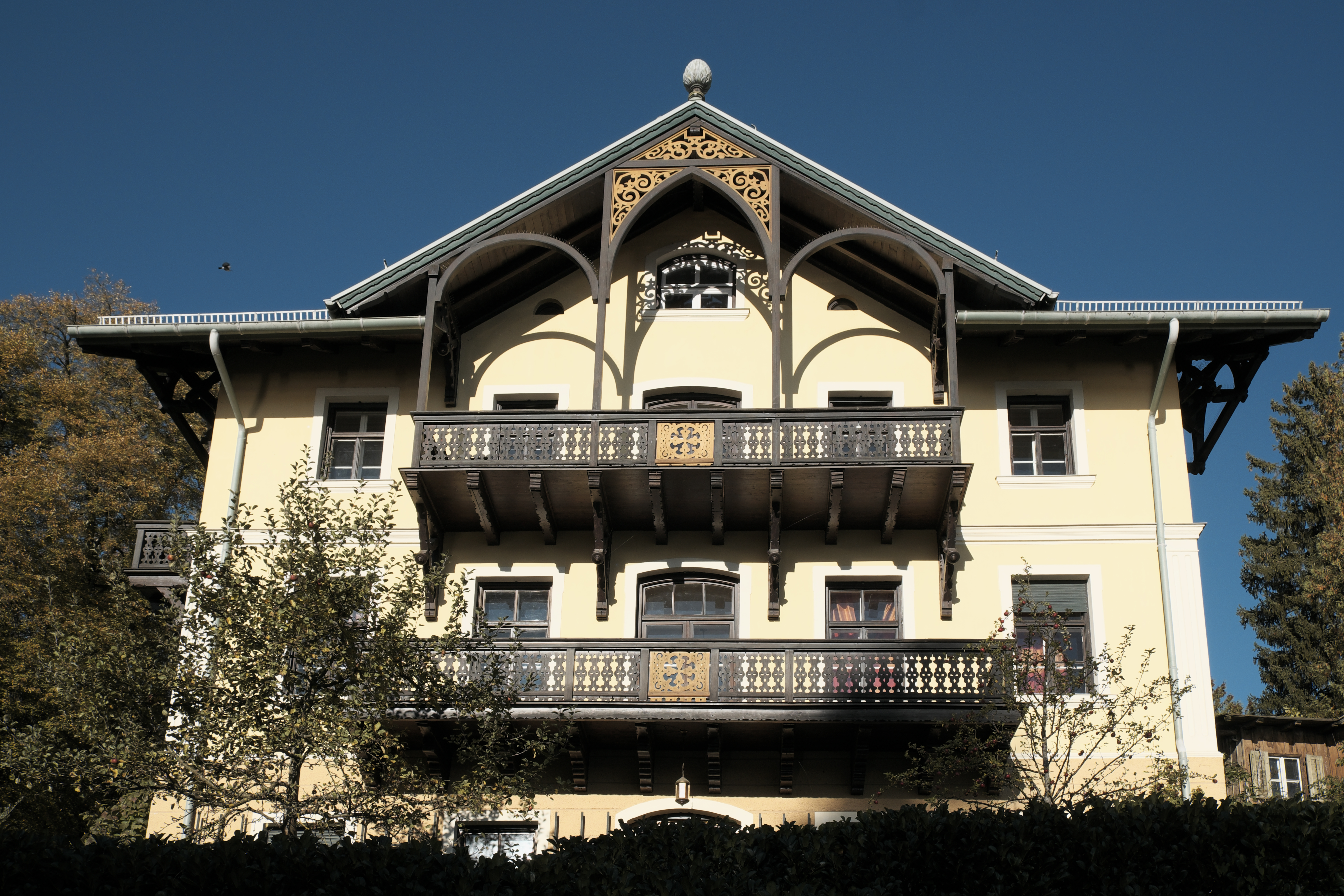 Landhaus in der Seestraße 18 in Unterschondorf (Schondorf am Ammersee) im Landkreis Landsberg am Lech (Bayern/Deutschland)